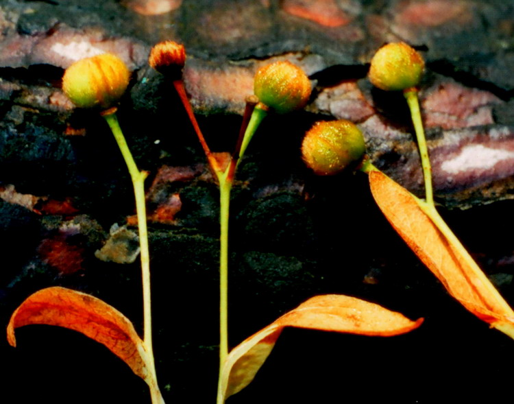 Орешки (плоды) Липы Нащокина (Tilia nasczokinii). Окр. Красноярска, руч. Каштак. сентябрь 2000 г. Автор: Николай Степанов.